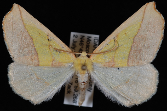 Sicya macularia